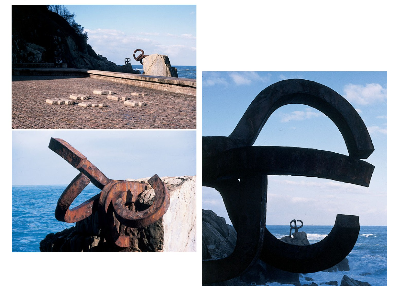 Eduardo Chillidaren “Haize Orrazia” lanaren hiru ikuspegi (1987), Donostian.